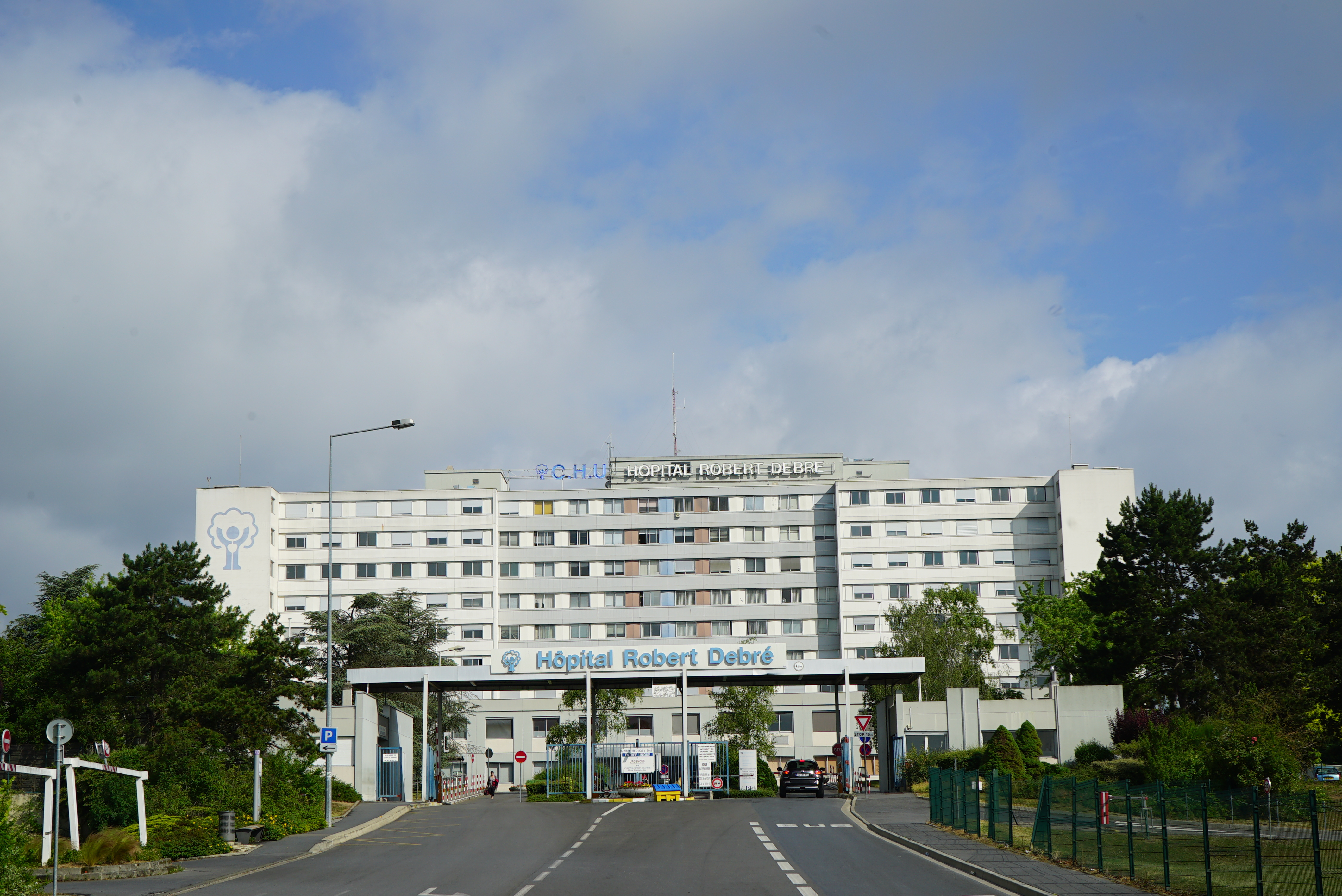 vue d'une partie du Centre Hospitalier Universitaire de Reims.